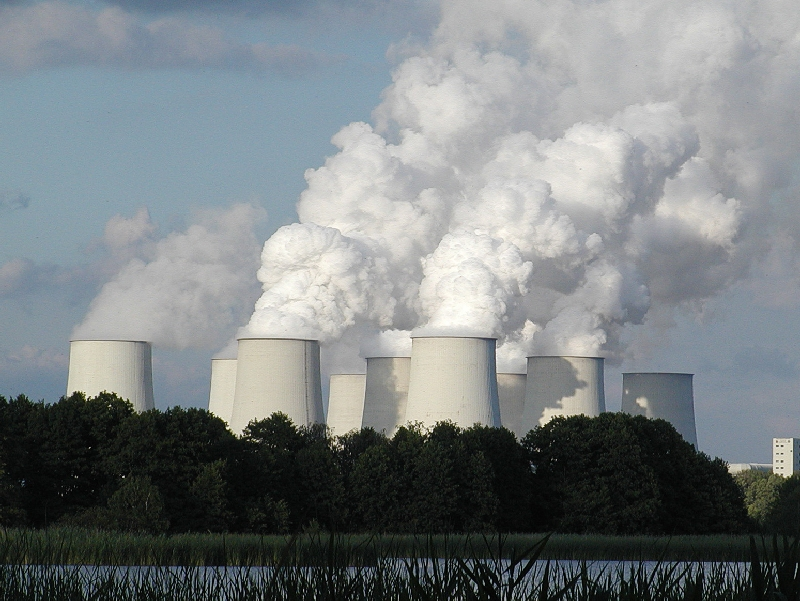 Kraftwerk Jänschwalde